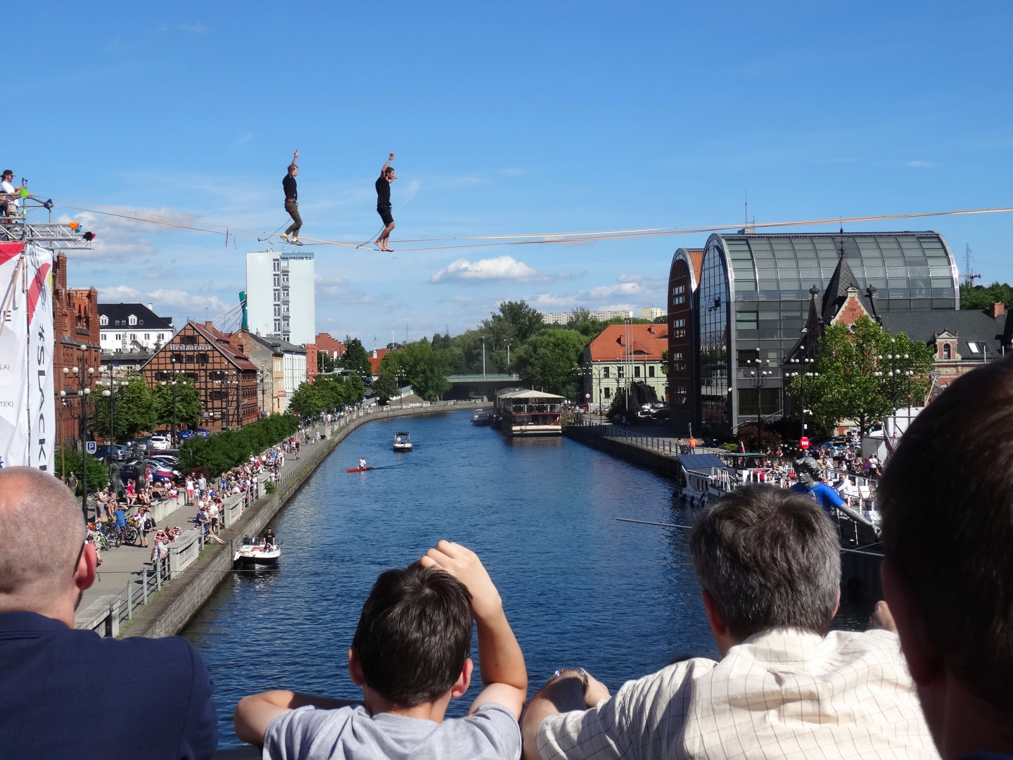 Zawody w przechodzeniu na linie nad rzeką Brdą (Slackline Games Bydgoszcz)